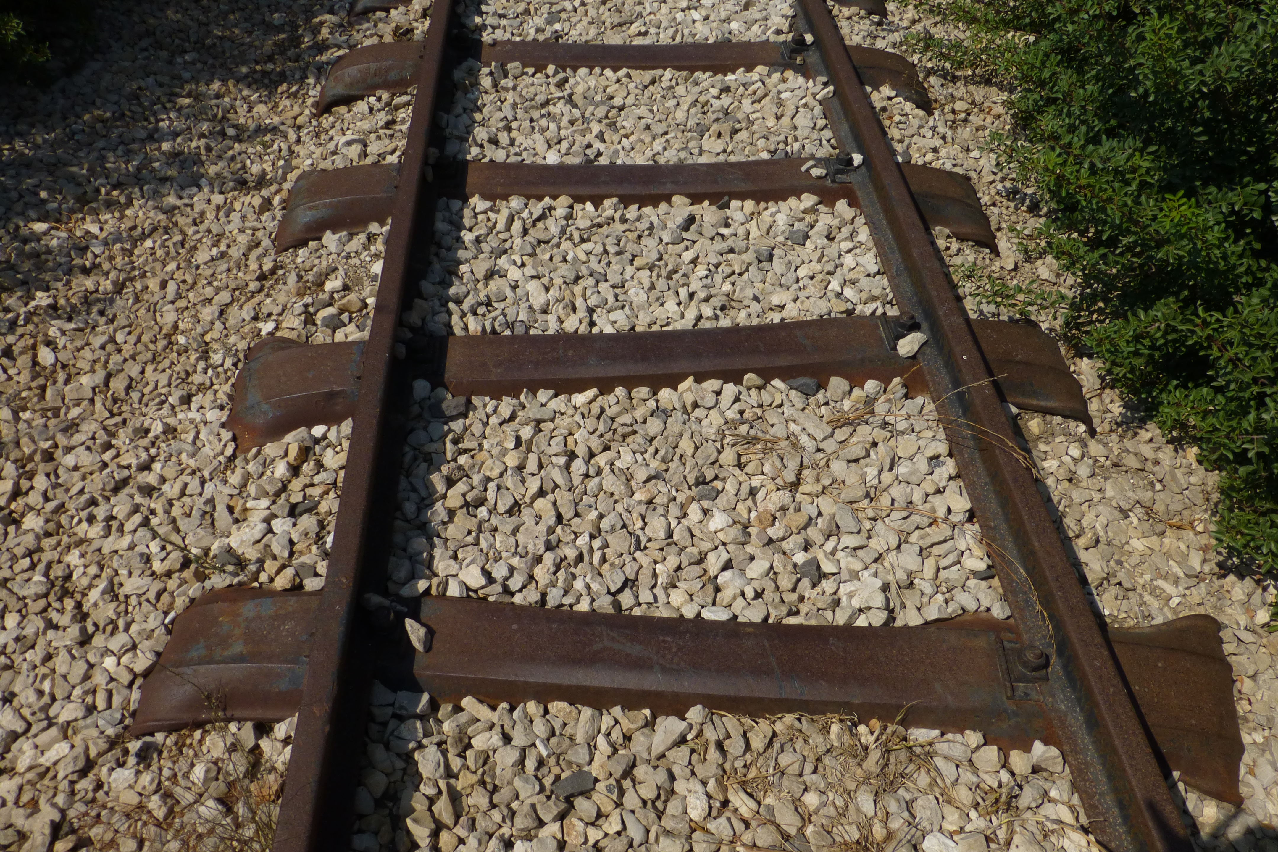 רכבת העמק - מעבירי מים והסוללה - צומת העמקים